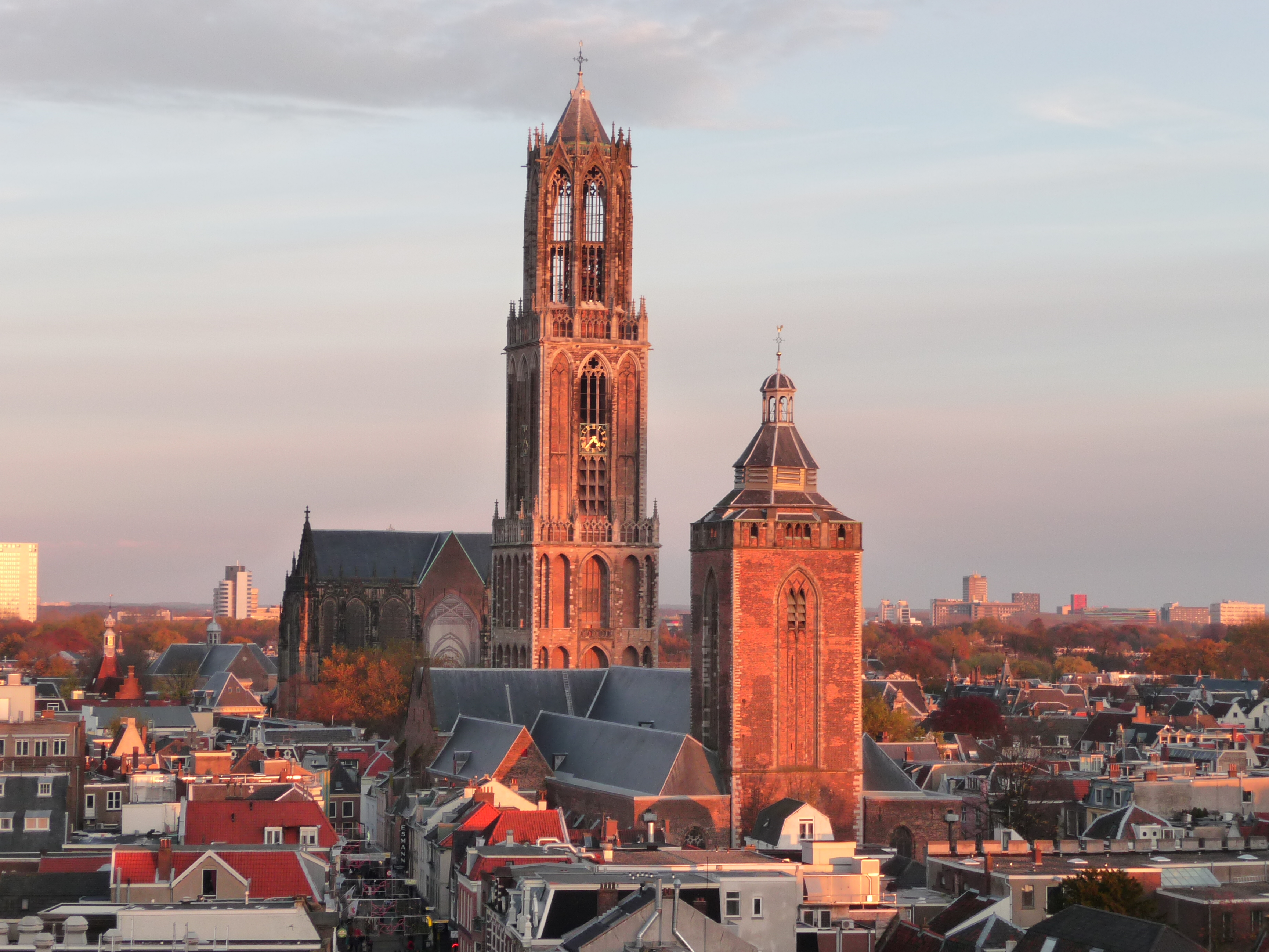 Panorama Utrecht met op de voorgrond de Buurkerk en op de achtergrond de Domtoren.